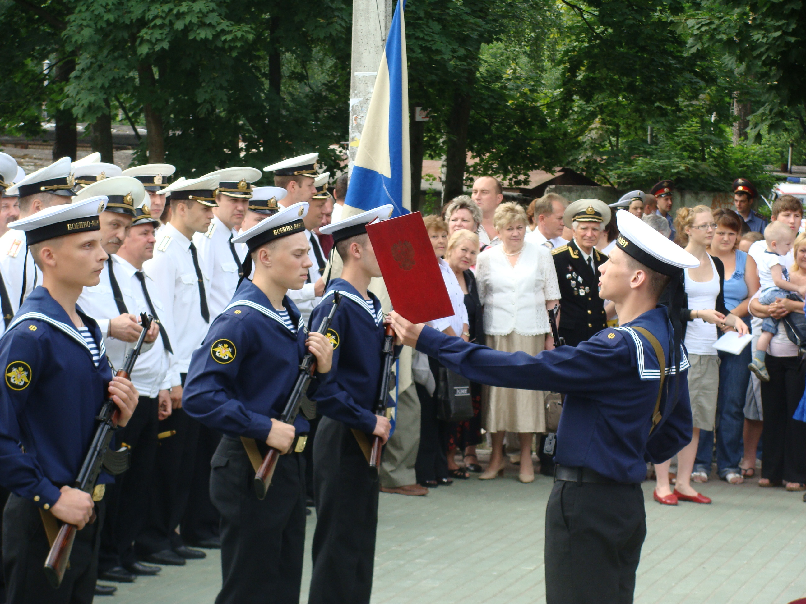 Kupavna NAVY Day Celebration 2009